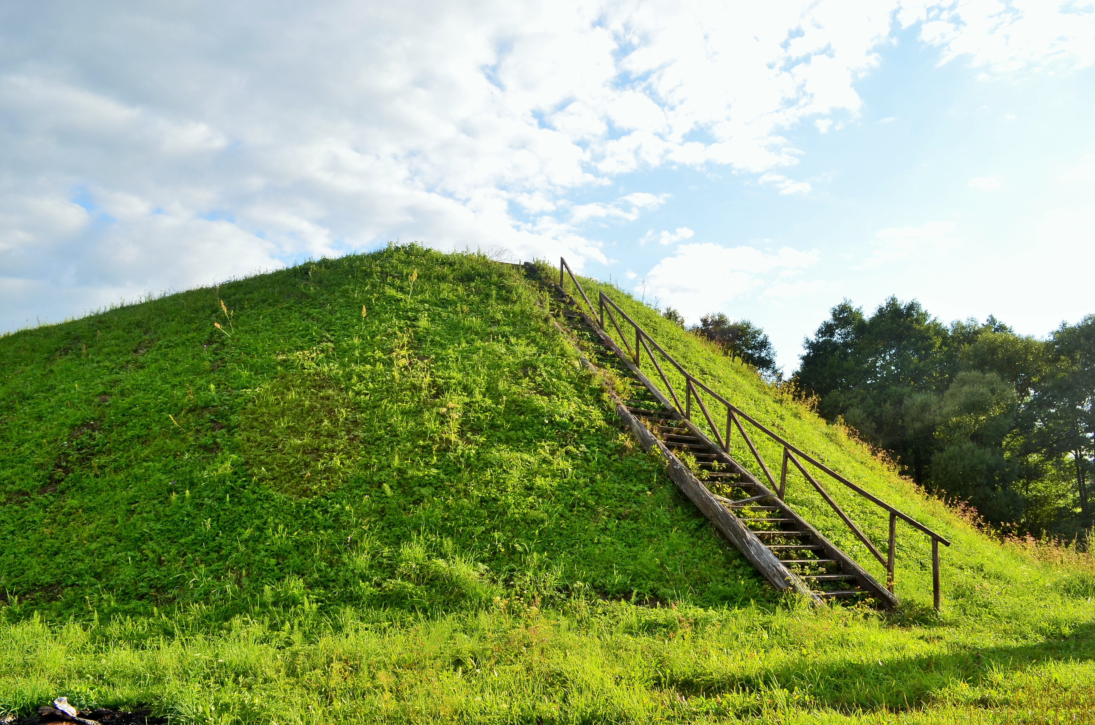 Milžinų kalnas iš rytų, Poteronys, Alytaus raj.